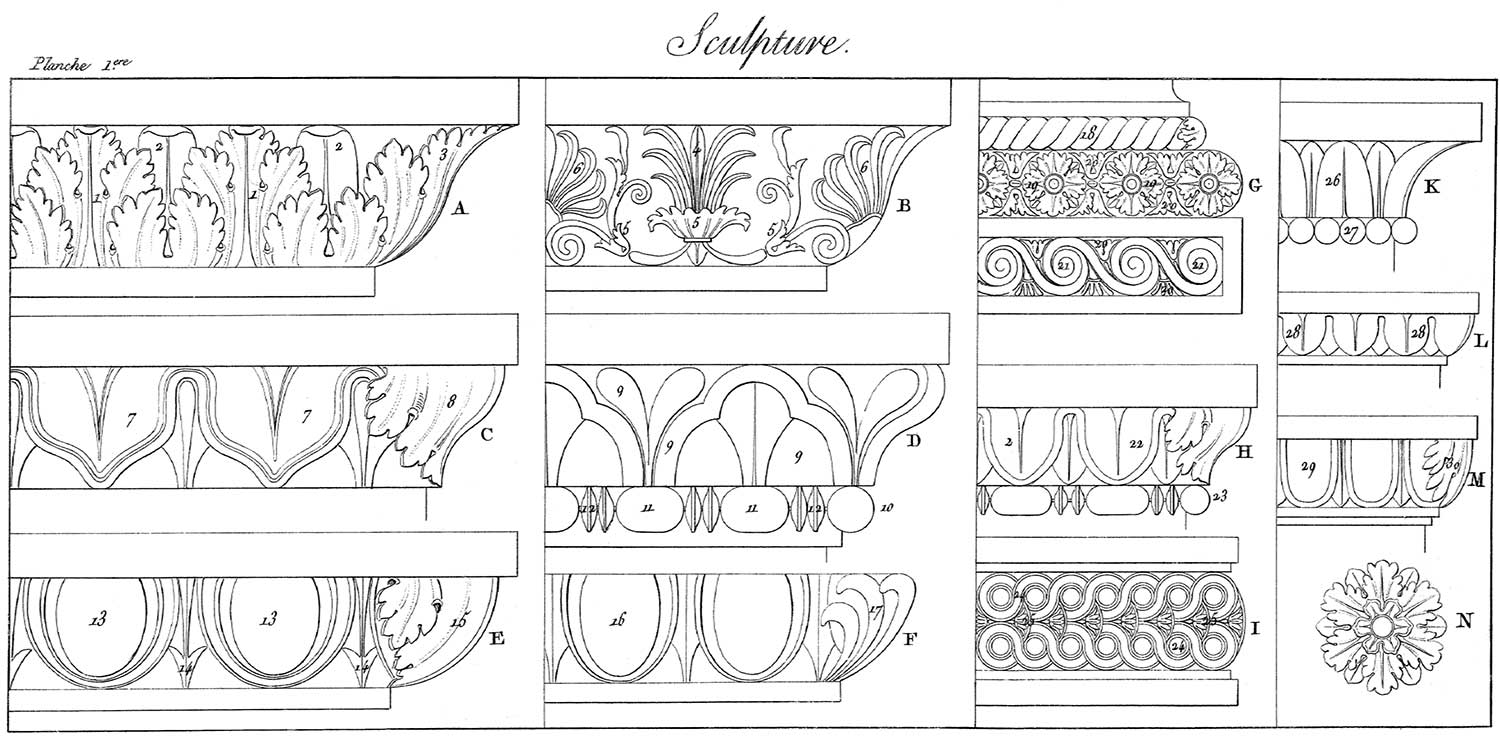 Description : A. Doucine couronné de son filet, sur laquelle sont taillées des feuilles d'acanthe et des feuilles d'eau - 1, feuille d'acanthe. - 2, feuille d'eau - feuille d'angle. B. Doucine sur laquelle sont taillées des palmettes à gousse ou écossas, et des palmettes à culot. - 4, palmette à culot. - 5, culot. - 6, palmette à écossas. C. Talon sur lequel sont taillés des rais-de-cœur doubles ou nervés - 7, rais-de cœur. - 8, feuille d'angle. D. Talon avec baguette sur lequel sont taillés des briquets ou trefles, et un chapelet à olive te pirouette - 9, trefle - 10, chapelet - 11, olive - 12, pirouette. E. Quart de rond sur lequel sont taillés des oves à double nervures avec dards - 13, ove - 14, dard, - 15, feuille d'angle. F. Quart de rond sur lequel sont taillé des oves simples. - 16, ove. - 17, feuille d'angles à écossas. G. Base composée d'une baguette, d'un tore et d'un socle, sur lesquels sont des taillés des rosaces avec culots, une cordelière et des postes avec culots, 18, cordelière - 19, Rosace. - 20, culot. - 21, poste. H. Talon avec baguette, sur lequel sont taillés des oves feuilles de refend à double filet, et un chapelet à olive et pirouette - 22, feuille de refend. 23, chapelet. I. Entrelacs double avec culots taillés sur une frise bombée. - 24, entrelacs - 25, culot. K. Cavet avec filet et baguette, sur lesquels sont taillés des feuilles d'eau et un chapelet à perle. - 26, feuille d'eau. - 27, perle. L. Quart de rond sur lequel sont taillés des feuilles de refend simples. - 28, feuilles. M. Quart de rond sur lequel sont taillés des goudrons ou canaux. 29, goudron. 30, feuille d'angle. N. Rosace.